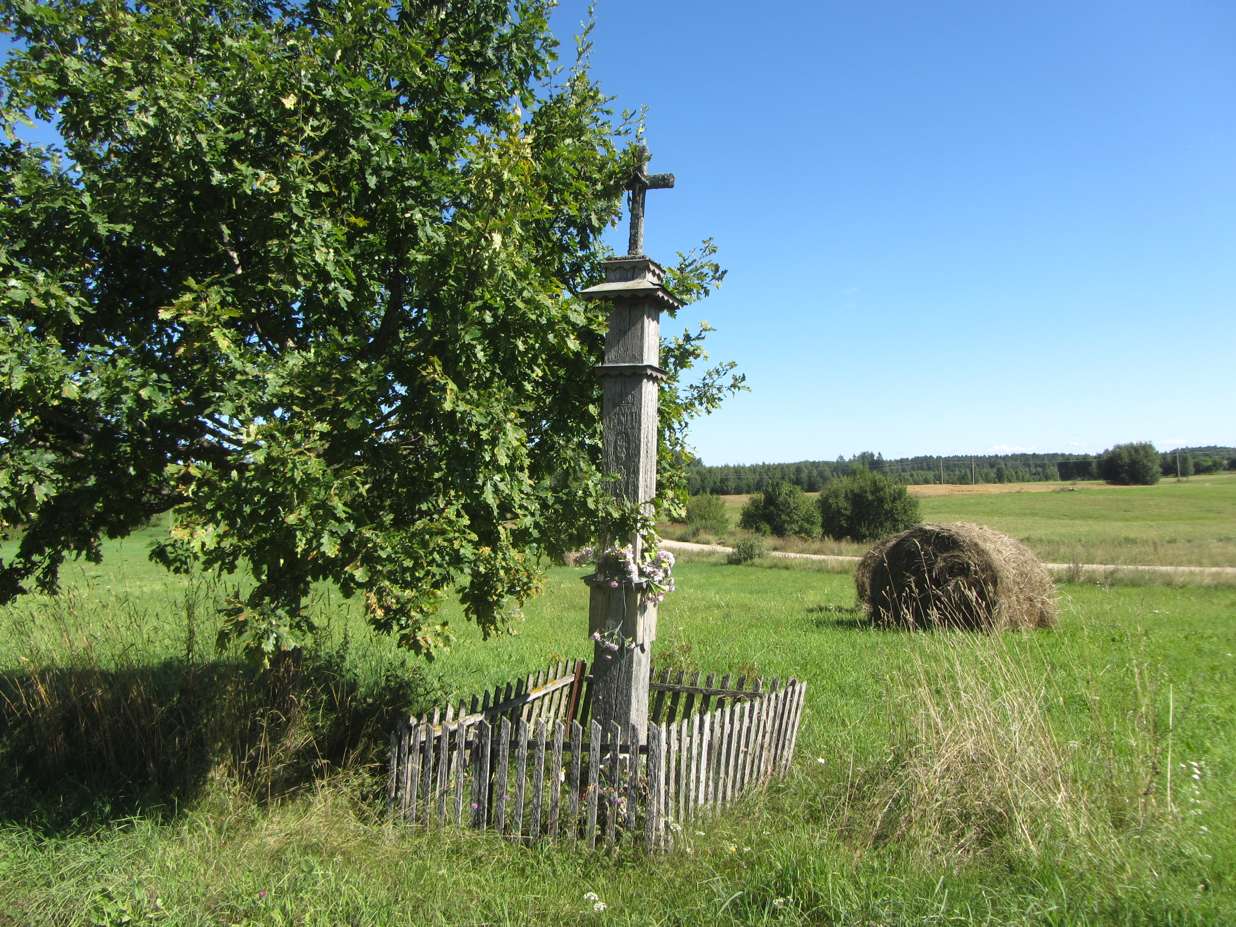 Rokiškio kaimiškoji sen., Lithuania